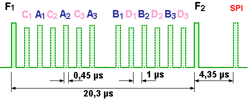 Antworttelegramm im Sekundärradarverfahren nach Mark X Standard